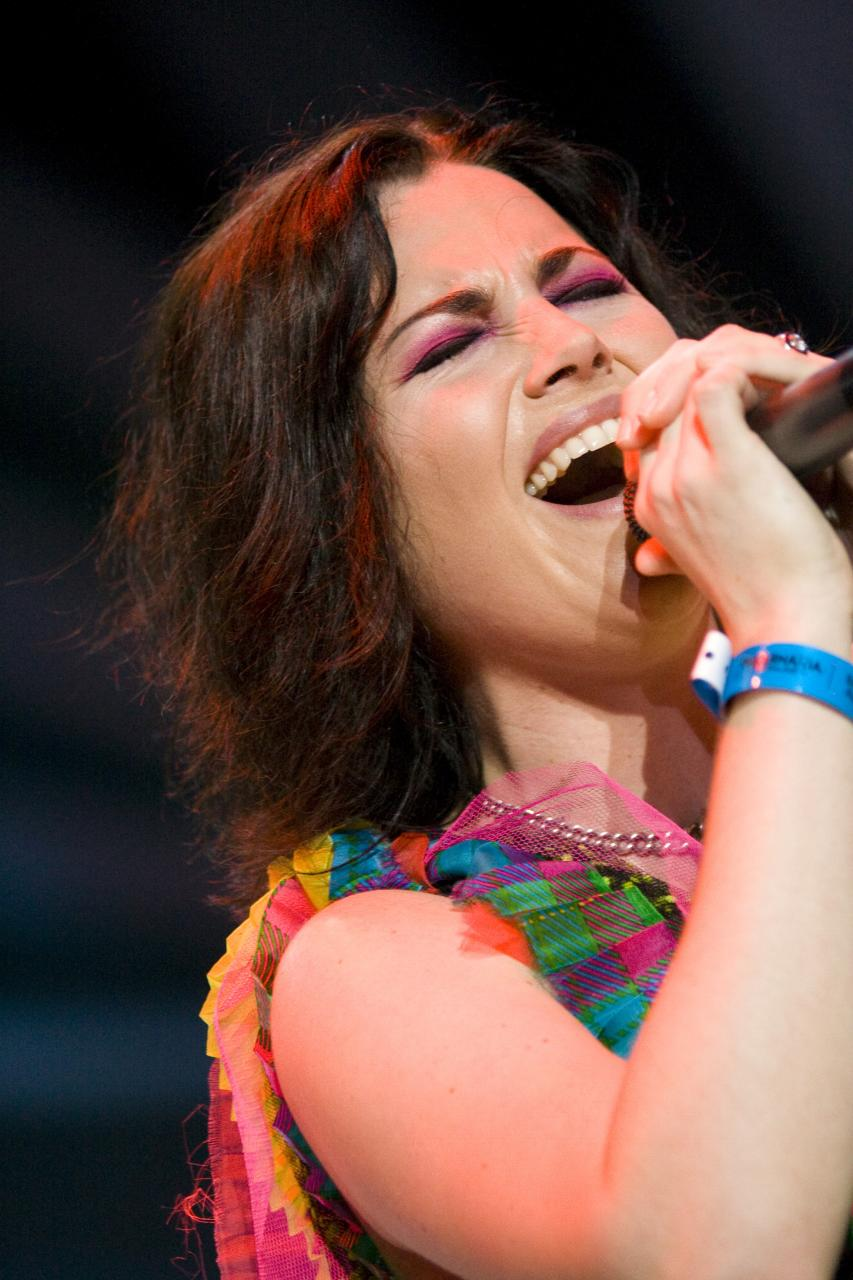 Evanescence @ Maquinaria Festival - 08/11/2009 - São Paulo, Brasil É proibida a cópia ou reprodução deste material sem a autorização do autor. Por favor, não publique nada daqui sem o devido crédito. Fotógrafo: Alexandre Cardoso